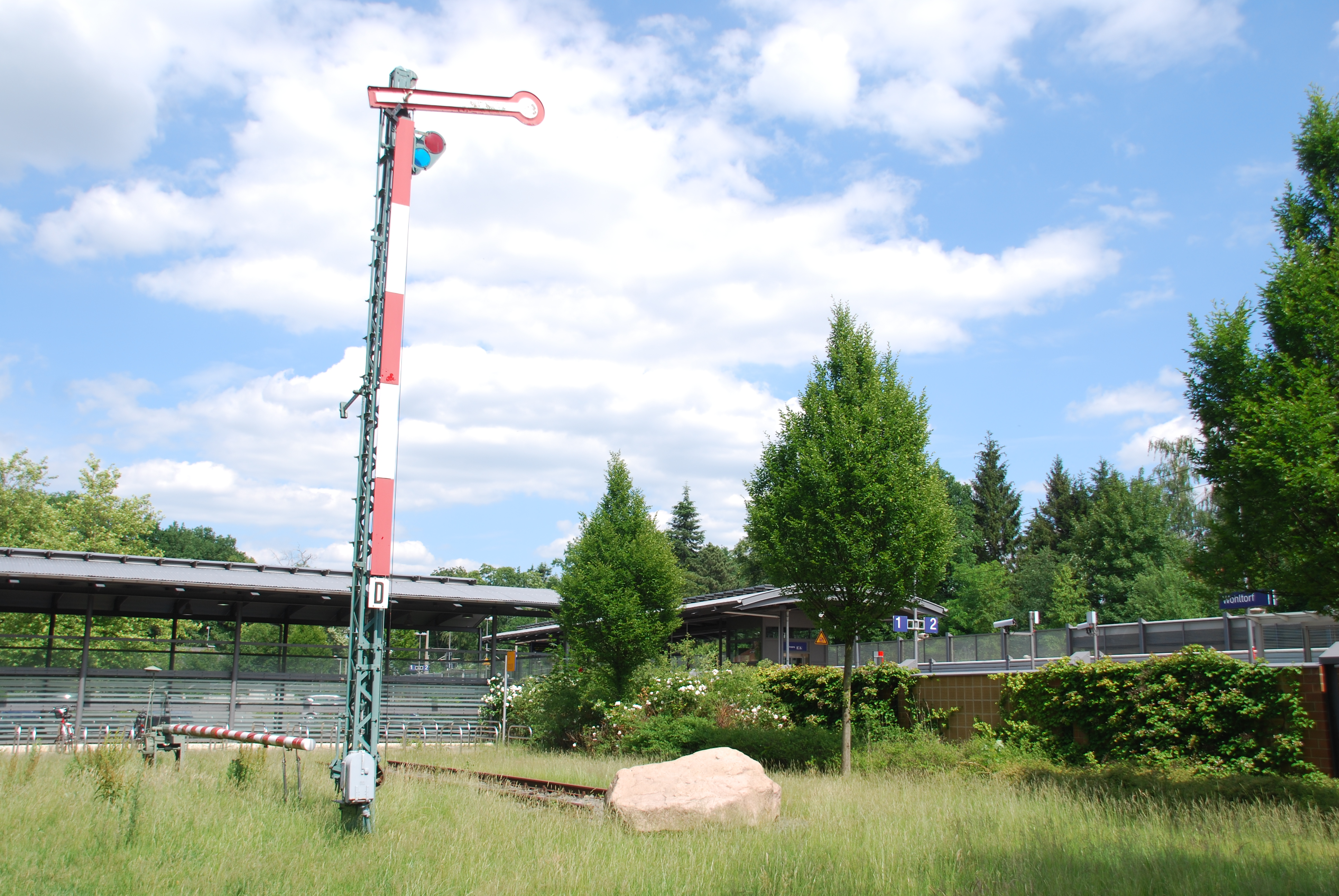 Wohltorf, S-Bahnhof mit Schrankenelement und Signal des früheren beschrankten Bahnübergangs (bis 1994)